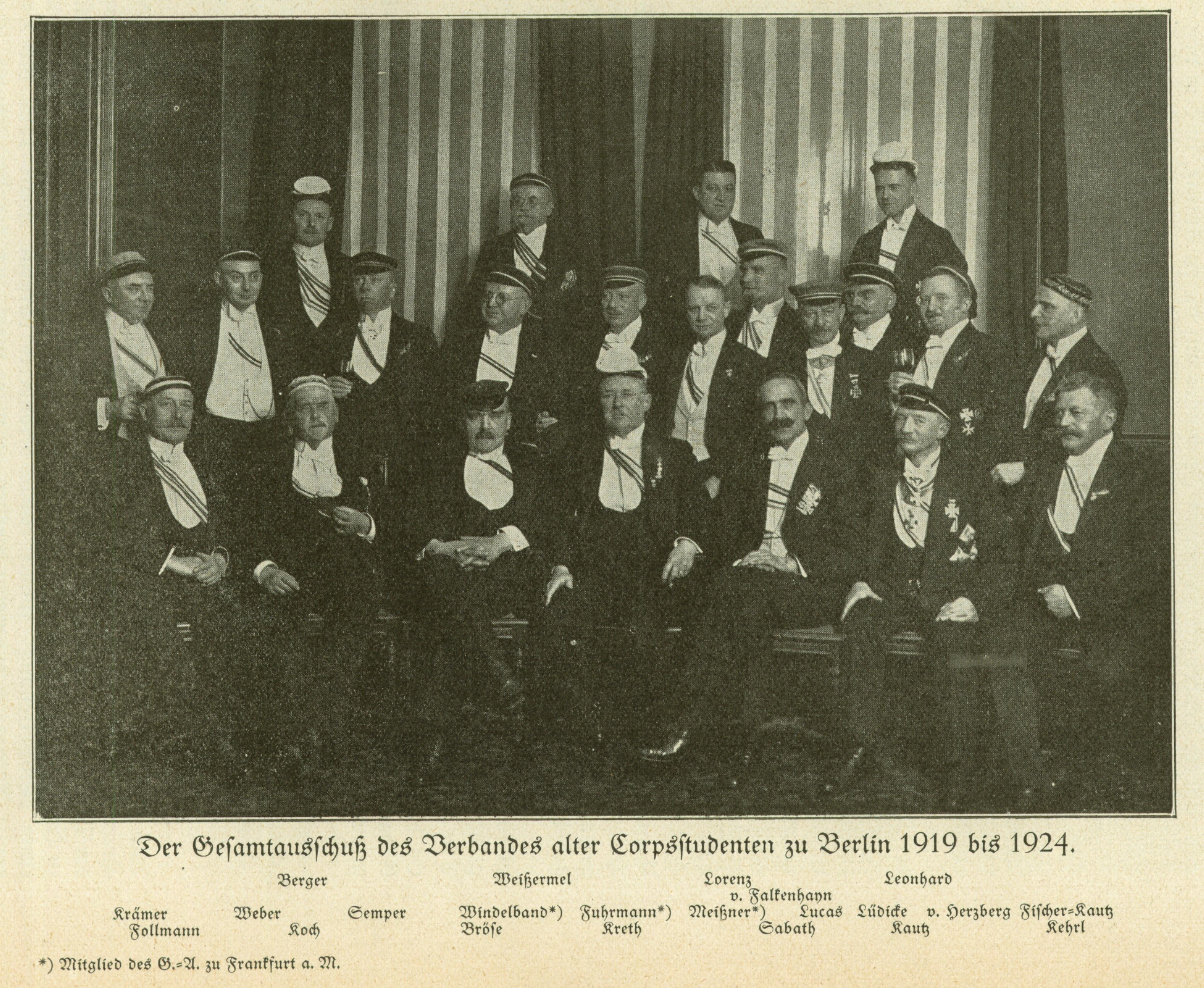 Photography of the Berlin Gesamtausschuß of the Verband Alter Corpsstudenten, showing Paul Bröse, Georg von Falkenhayn, Rainer Fischer-Kautz, Hans Follmann, Hans Fuhrmann,Georg Kautz, John Koch (Anglist), Hermann Kreth, Emil Lorenz, Georg Lucas, Paul Lüdicke, Werner Meißner (Jurist), Hermann Sabath, Carl Ferdinand Semper und Waldemar Weißermel and Erich Windelband.